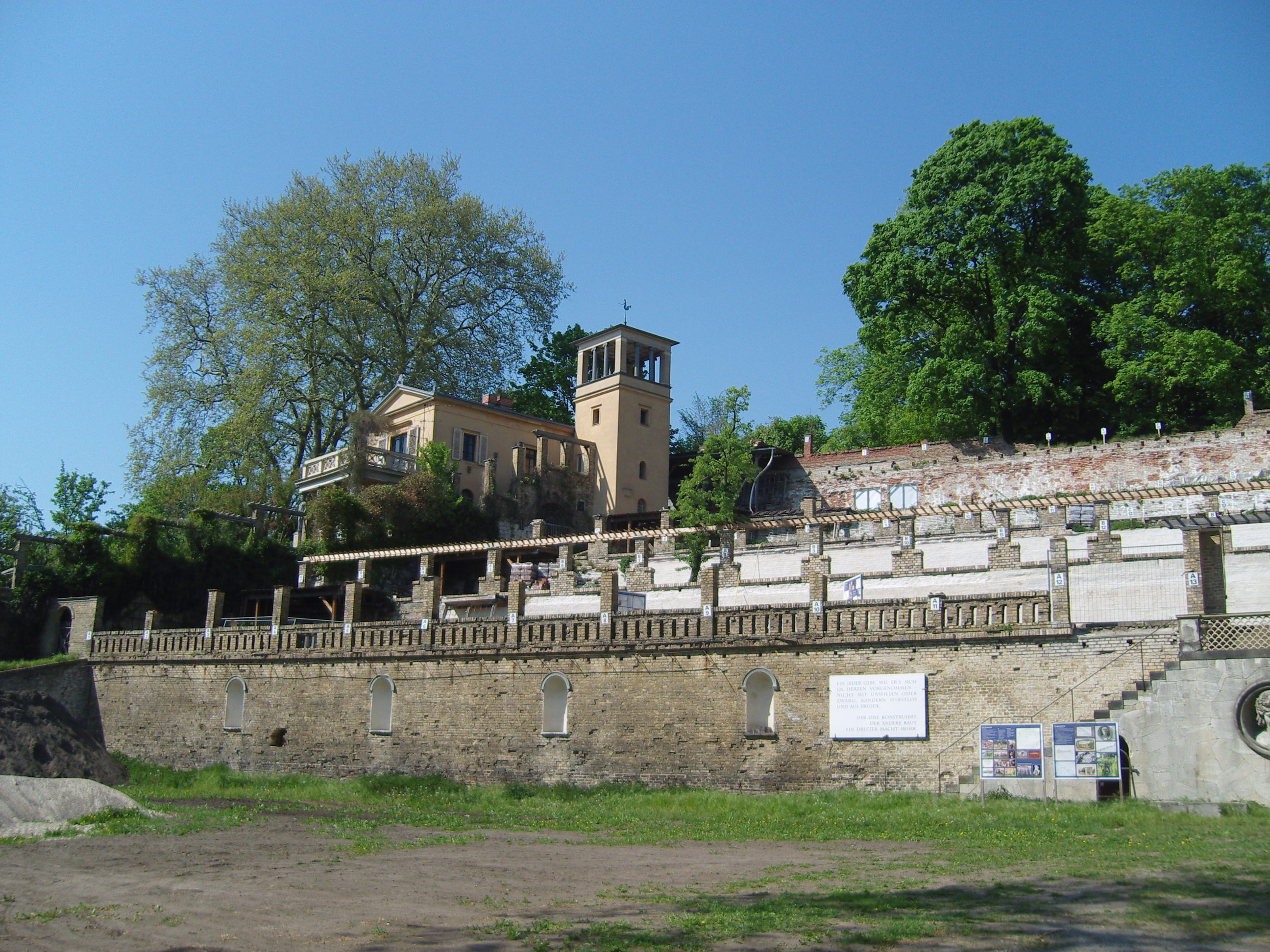 Winzerberg in Potsdam während der Sanierung 2012